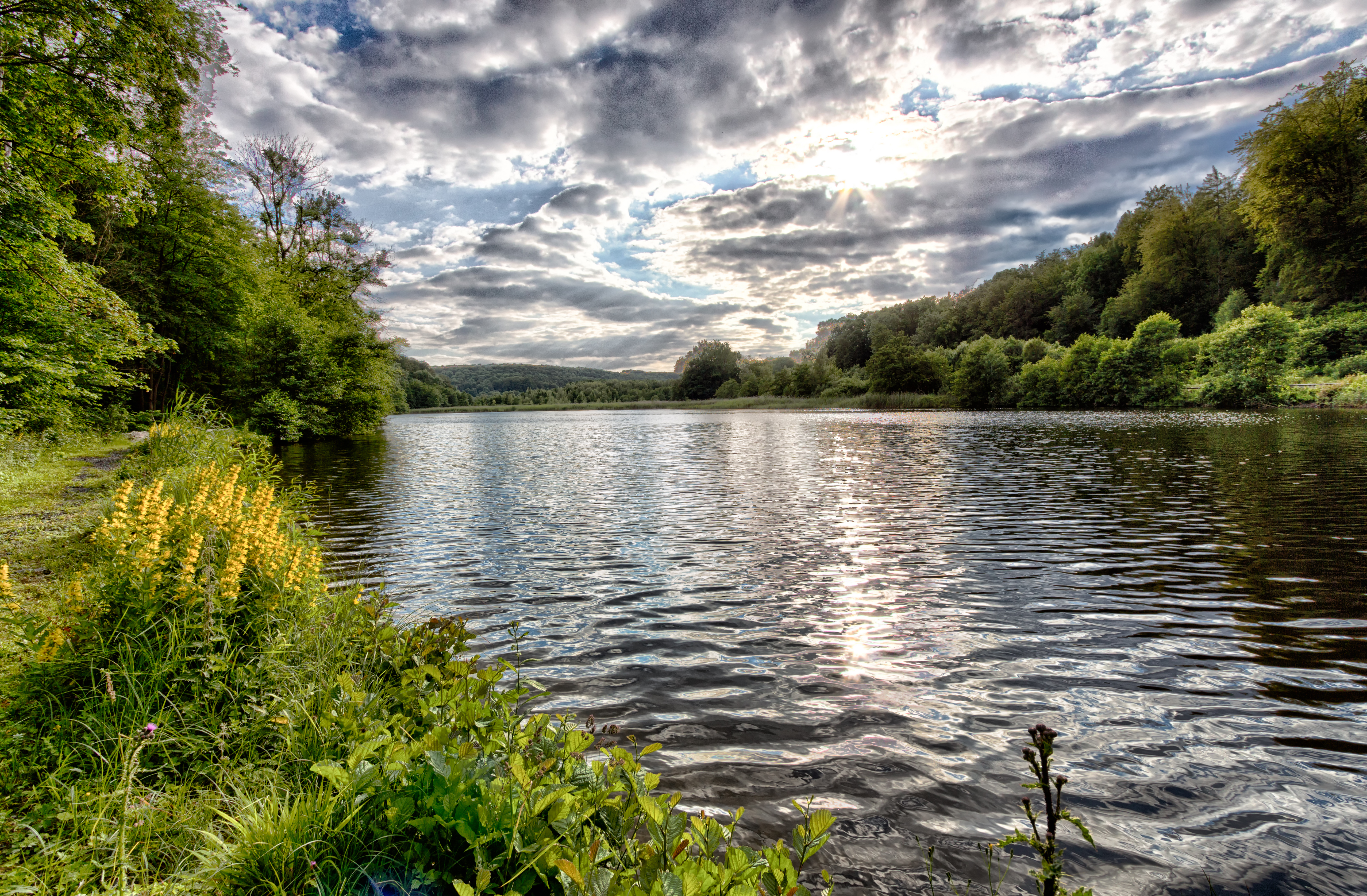 Blick auf den Itelteich bei Walkenried, Niedersachsen, Deutschland.